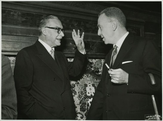 Ricevimento offerto ai delegati e funzionari della C.E.C.A., Nicola Picella colloquia con Gaetano Azzariti